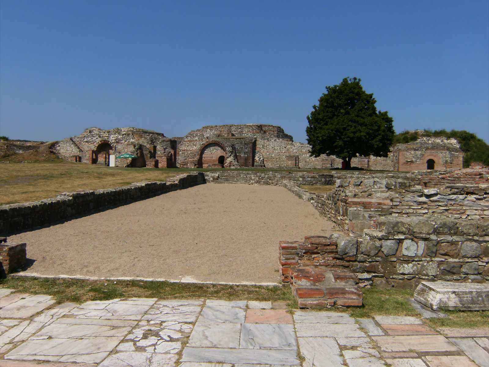 Археолошко налазиште Феликс Ромулијана код Зајечара